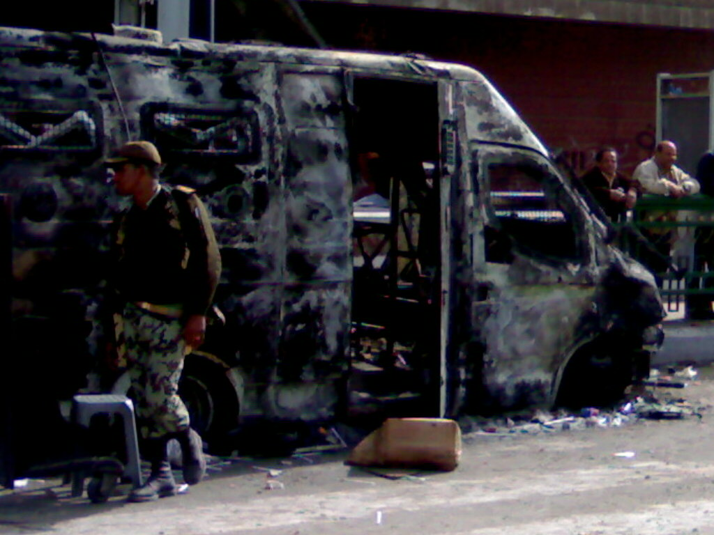 ضابط بالجيش المصري يقف بجوار إحدى عربات الشرطة التي احترقت أثناء ثورة 25 يناير. تاريخ الصورة: 29 يناير 2011 مكان التقاط الصورة: ميدان التحرير، عند بداية شارع قصر العيني.